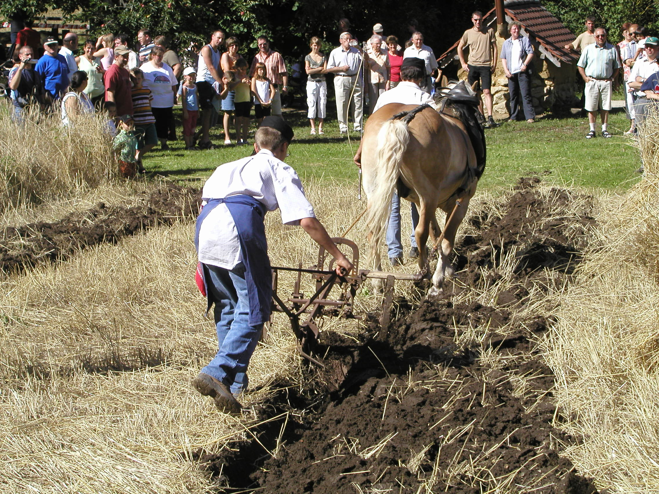 Schnitterfest Maihingen